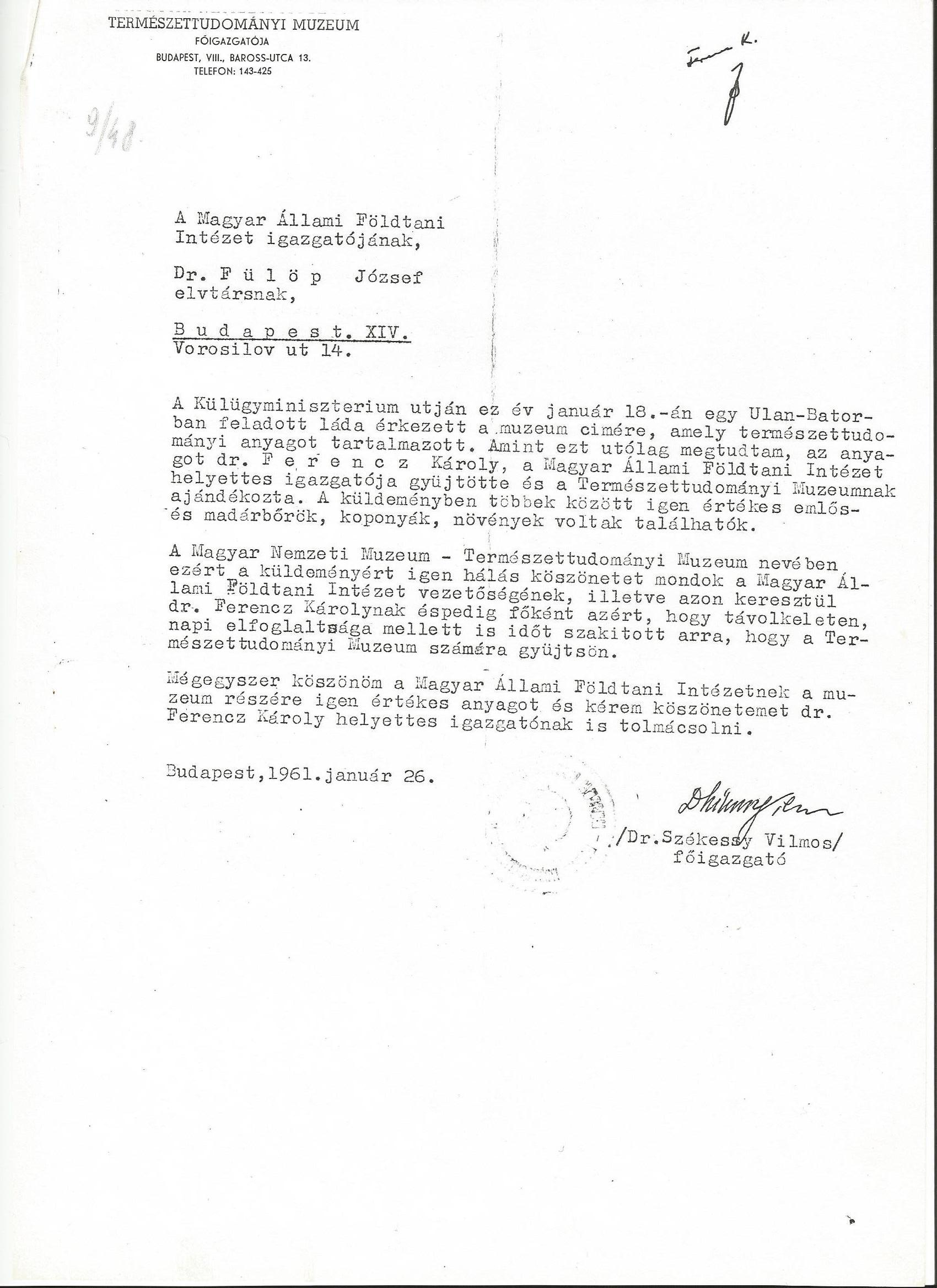 Dr. Ferencz Károly geológusnak irt köszönő levél, Dr. Székessy Vilmos főigazgatótól. 1961.01.26